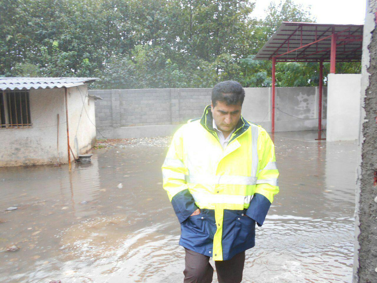 حضور میدانی و به موقع شهردار عباس آباد موسی پسندی در بحران سیل شمال کشور و تشکیل به موقع ستاد بحران که موجب کاهش آسیب دیدگی سیل گردید.